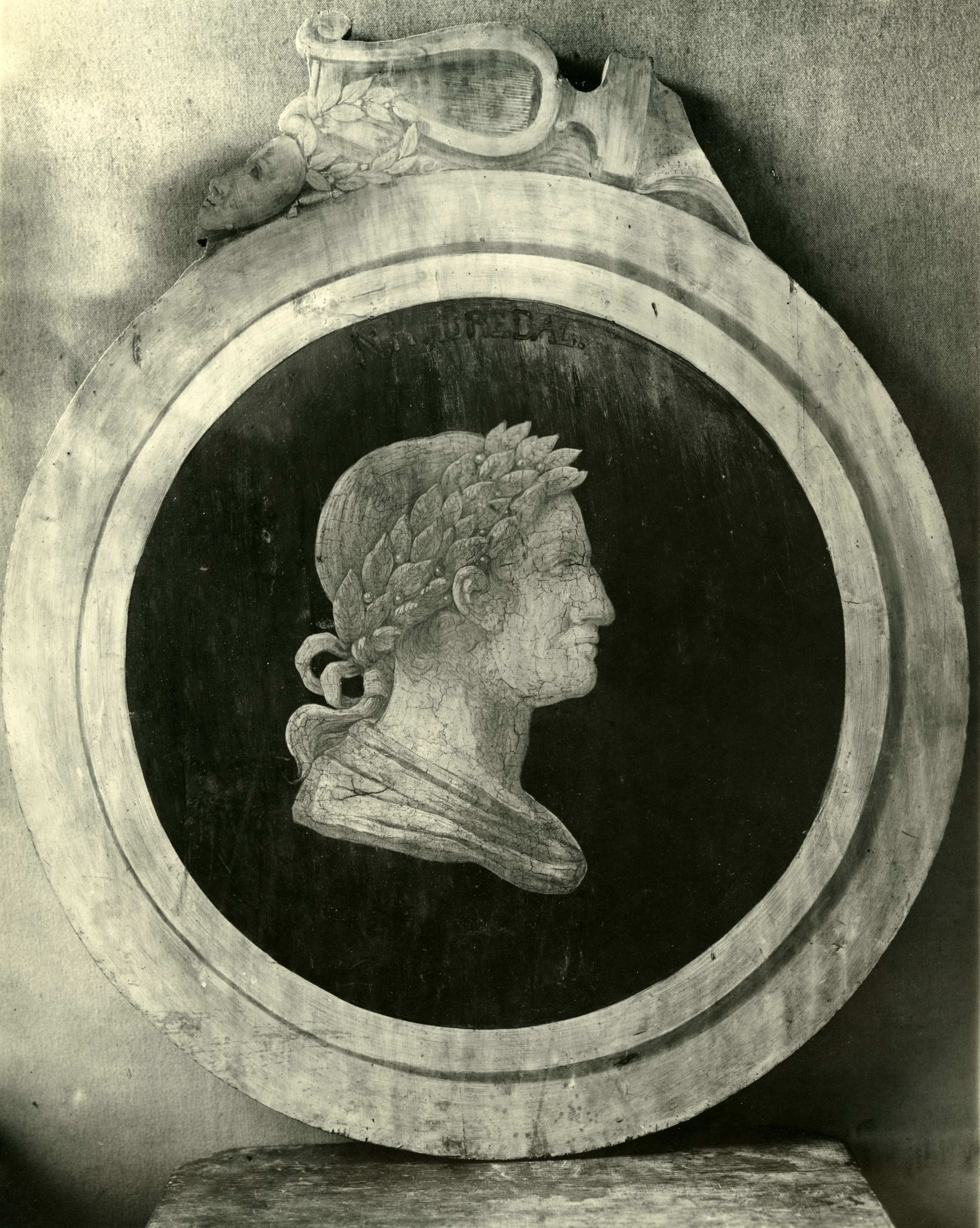 Format: Fotopositiv. Niels Krog Bredal, født 1733, død 1778, norsk forfatter og teaterdirektør